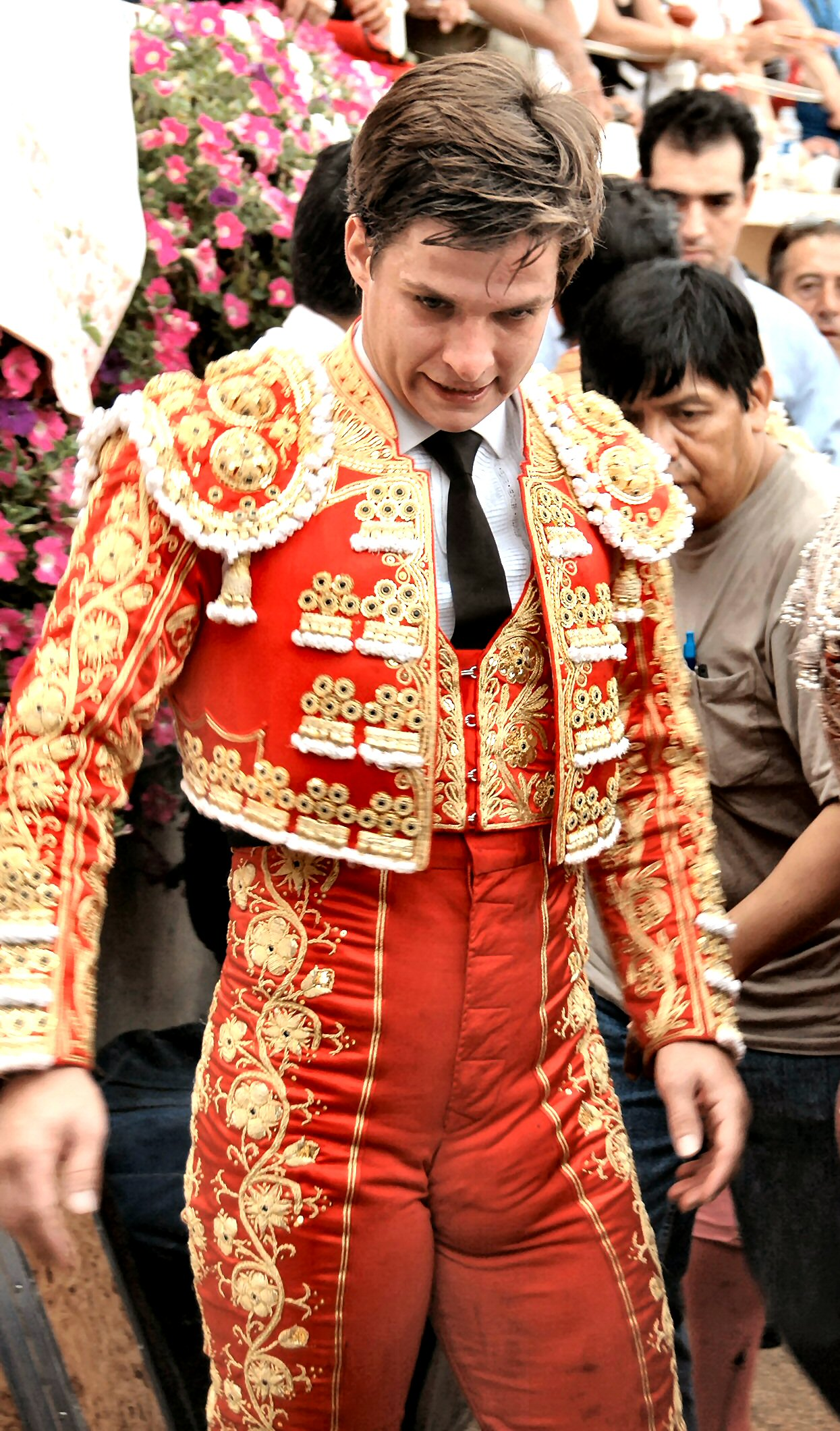 El Juli, Bayonne 5 Septembre 2004